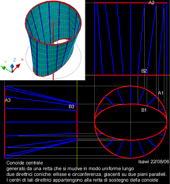 Modellazione geometrica di un conoide, il quale ha come direttrici di bordo un'ellisse ed una circonferenza. I centri di tali direttrici appartengono alla retta di sostegno del conoide.